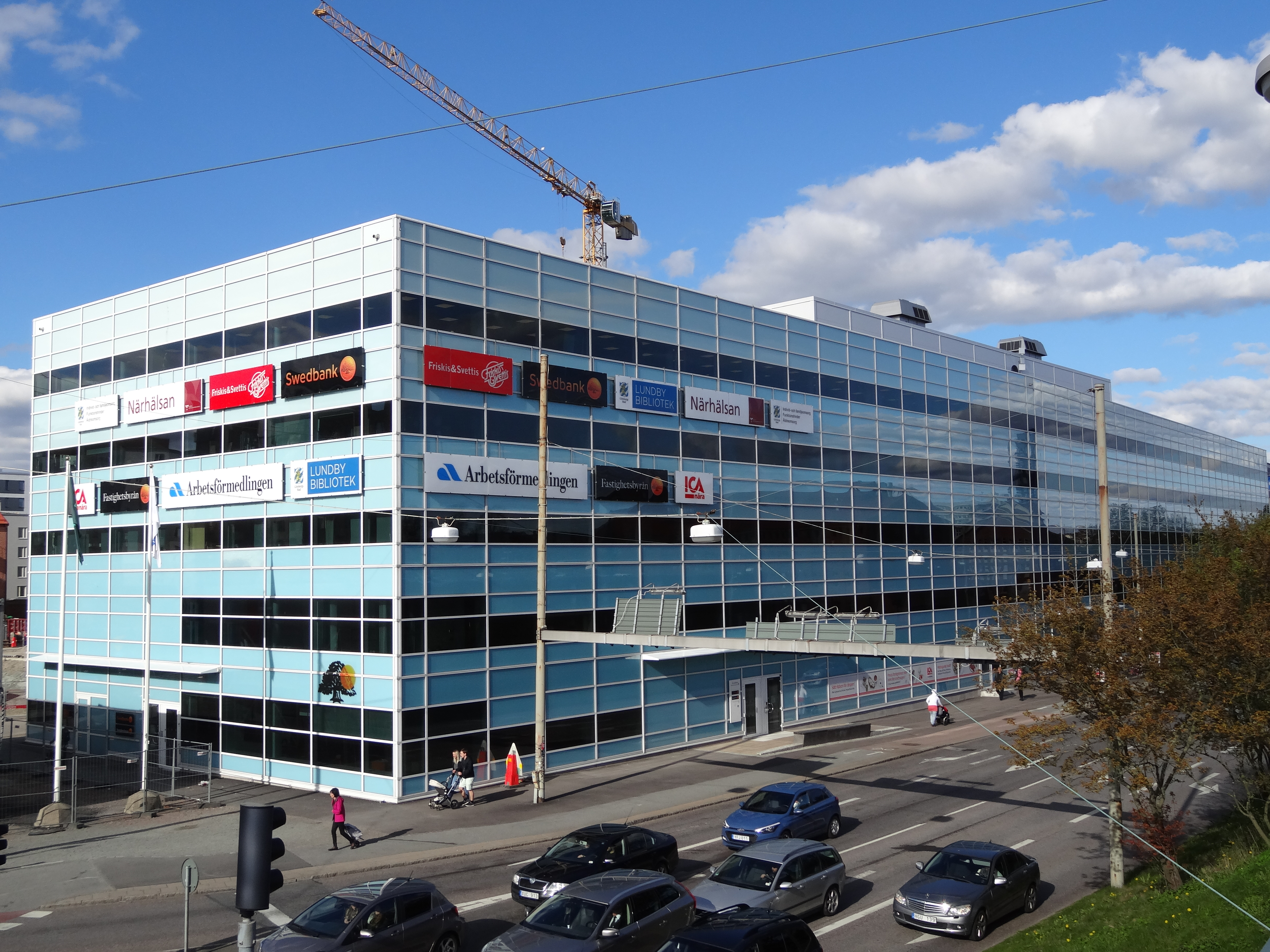 Glasiären, ett kontorshur vid Vågmästareplatsen i Kvillebäcken, Göteborg. Inhyser bland annat Lundby Bibliotek.